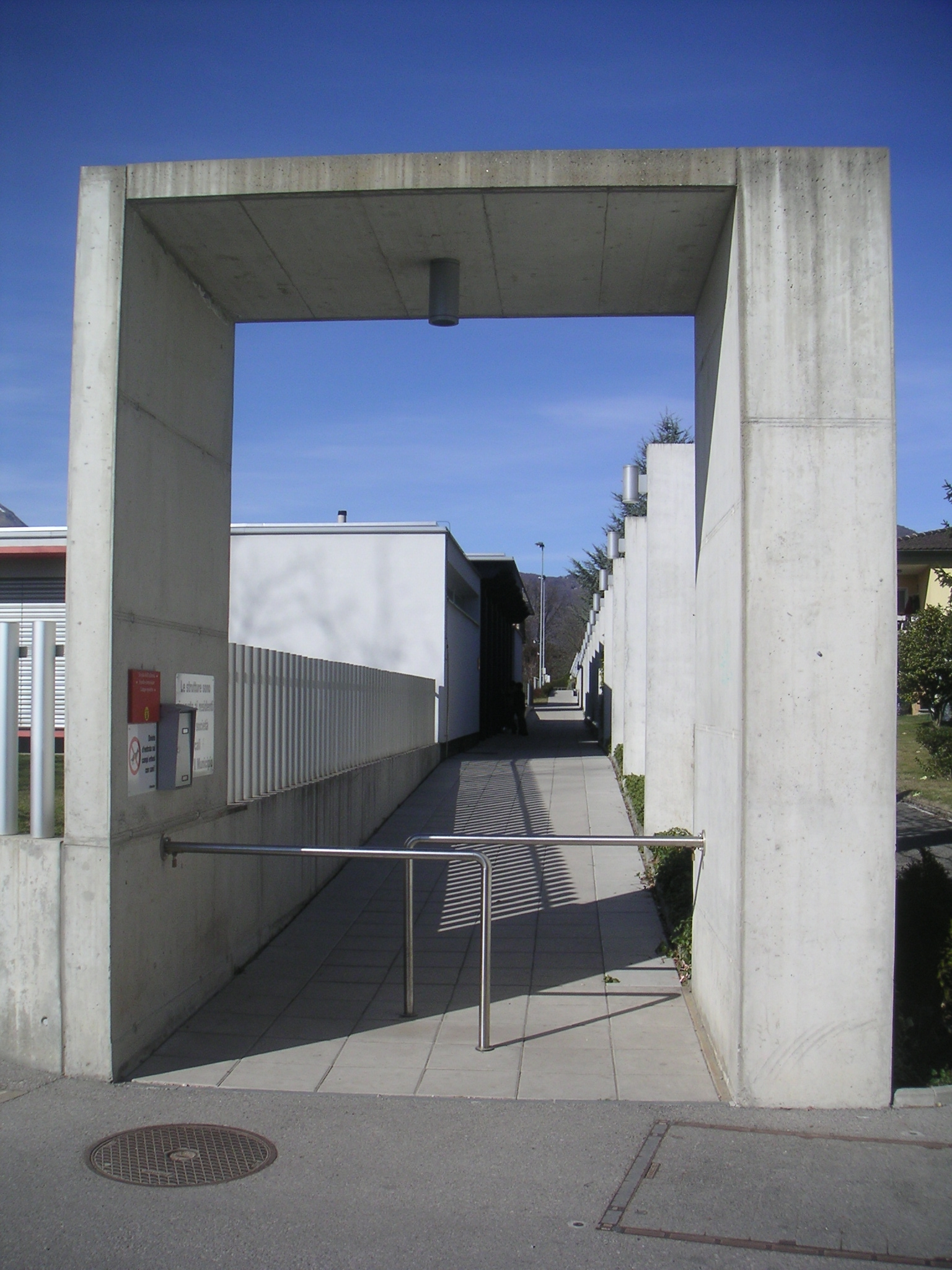 Cureglia (CH - Svizzera) L'entrata della scuola elementare del villaggio Autore Fernando Pescia paco (scrivimi)